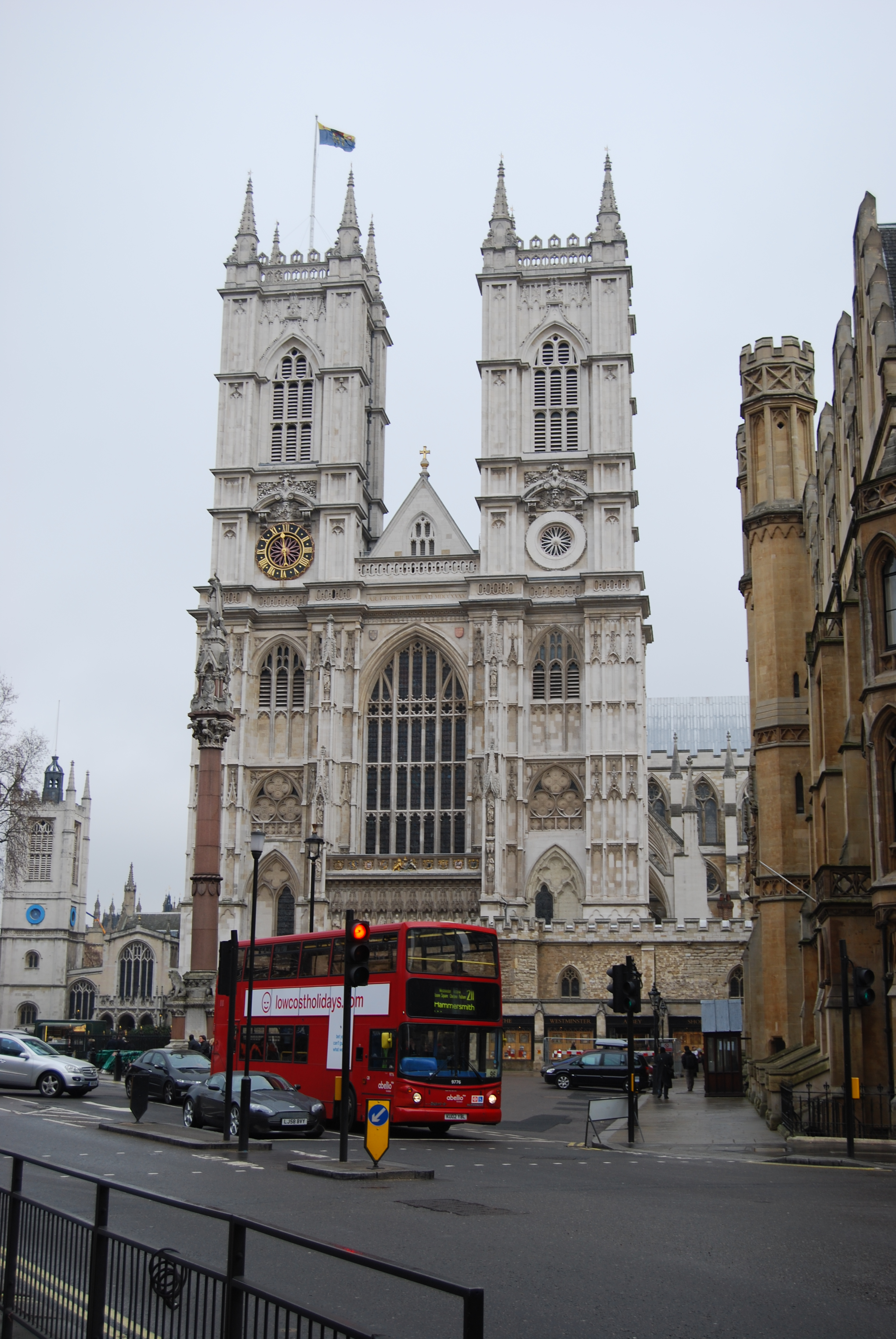 Westminister Abbey